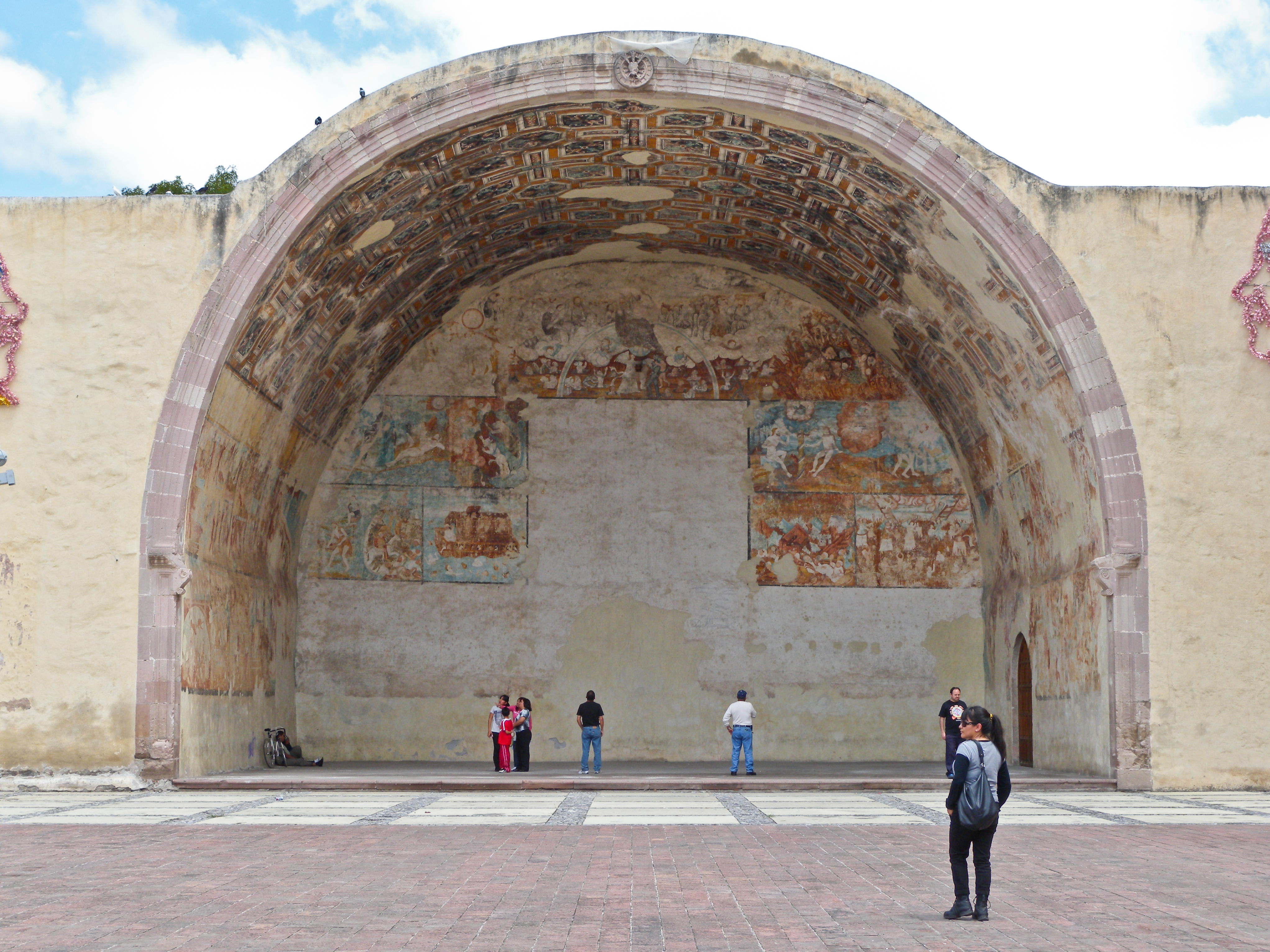 Convento de Actopan, Hidalgo.